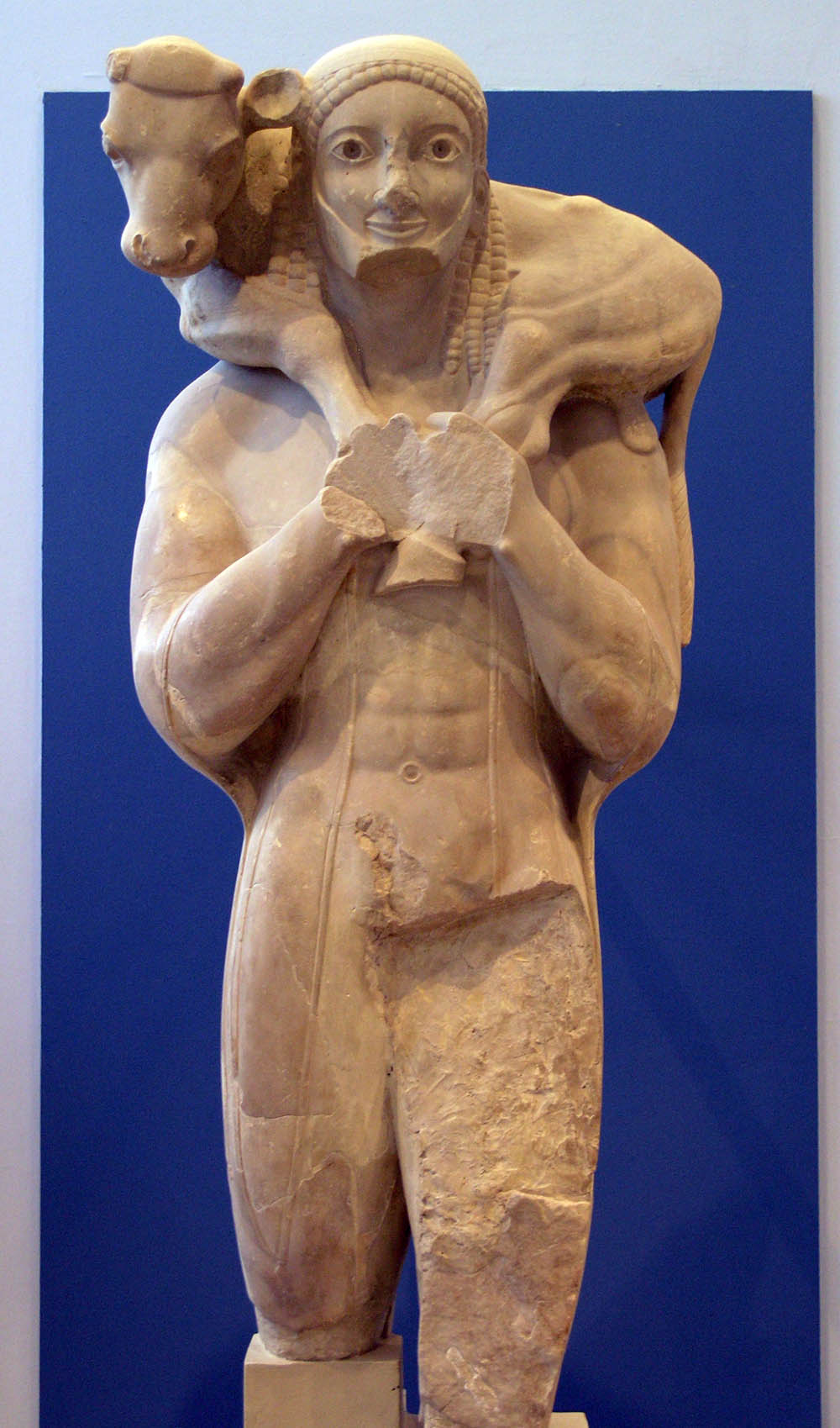 Statue d'un jeune homme barbu. Il est vêtu d'un himation court et il porte un veau sur ses épaules pour le sacrifier à la déesse. L'inscription fragmentaire sur la base conserve le nom du dédicant de cette statue votive : [Rh]ombos.